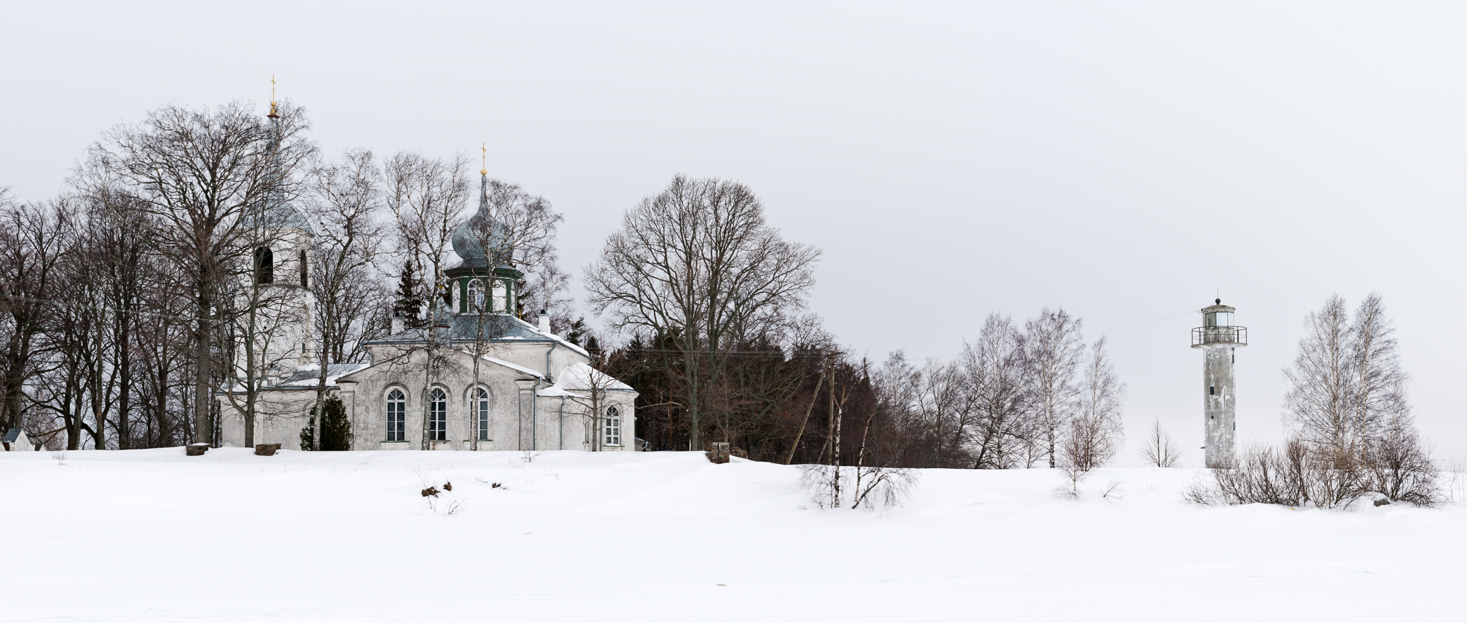 Nina küla Jumalaema Kaitsmise kirik.1827. Panoraam 6 kaadrist.